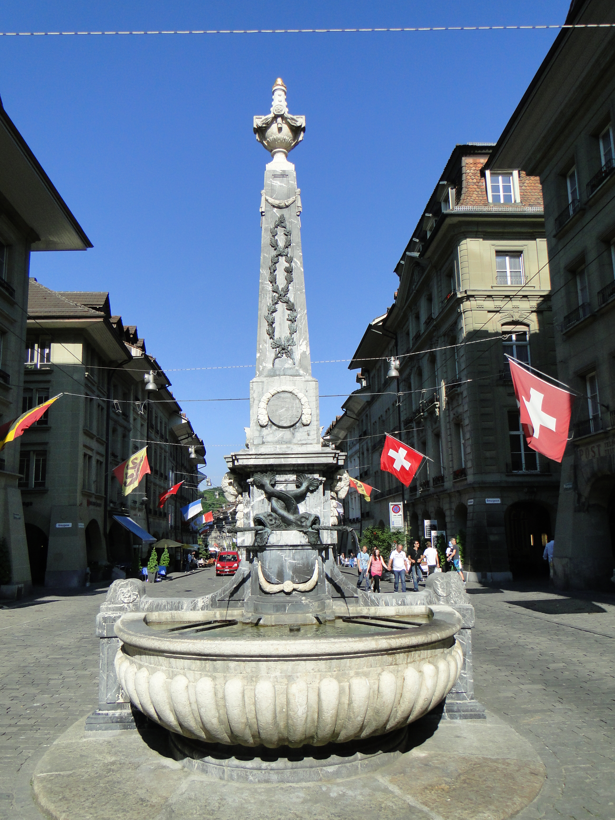 Bern